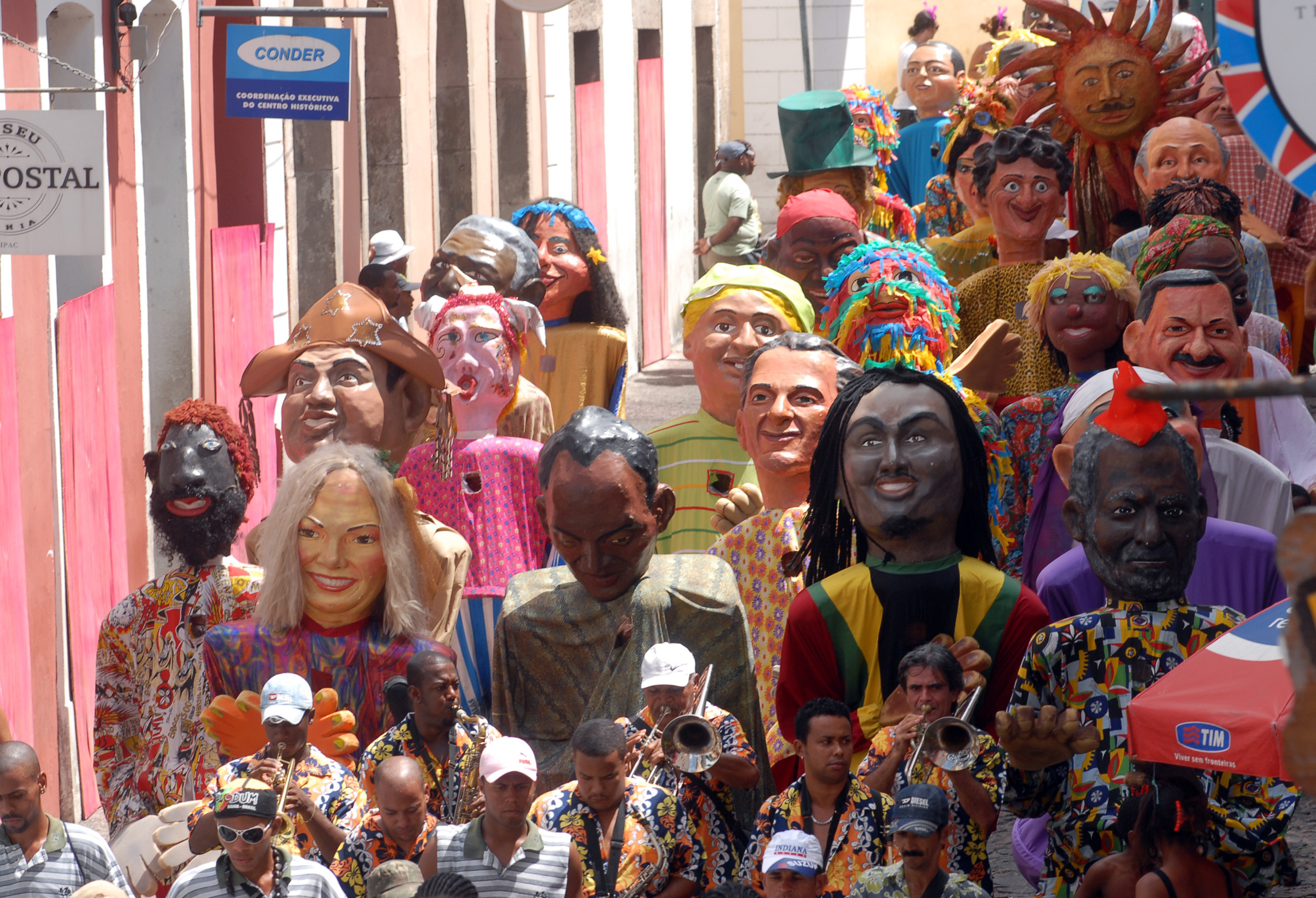 Salvador (BA) - O Bloco dos Bonecões desfila nas ruas do Pelourinho, centro histórico da capital baiana.